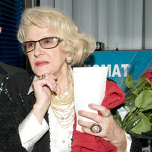 Светлана Дружинина на премьере фильма «Виват, Анна» 8 июня 2011 года.